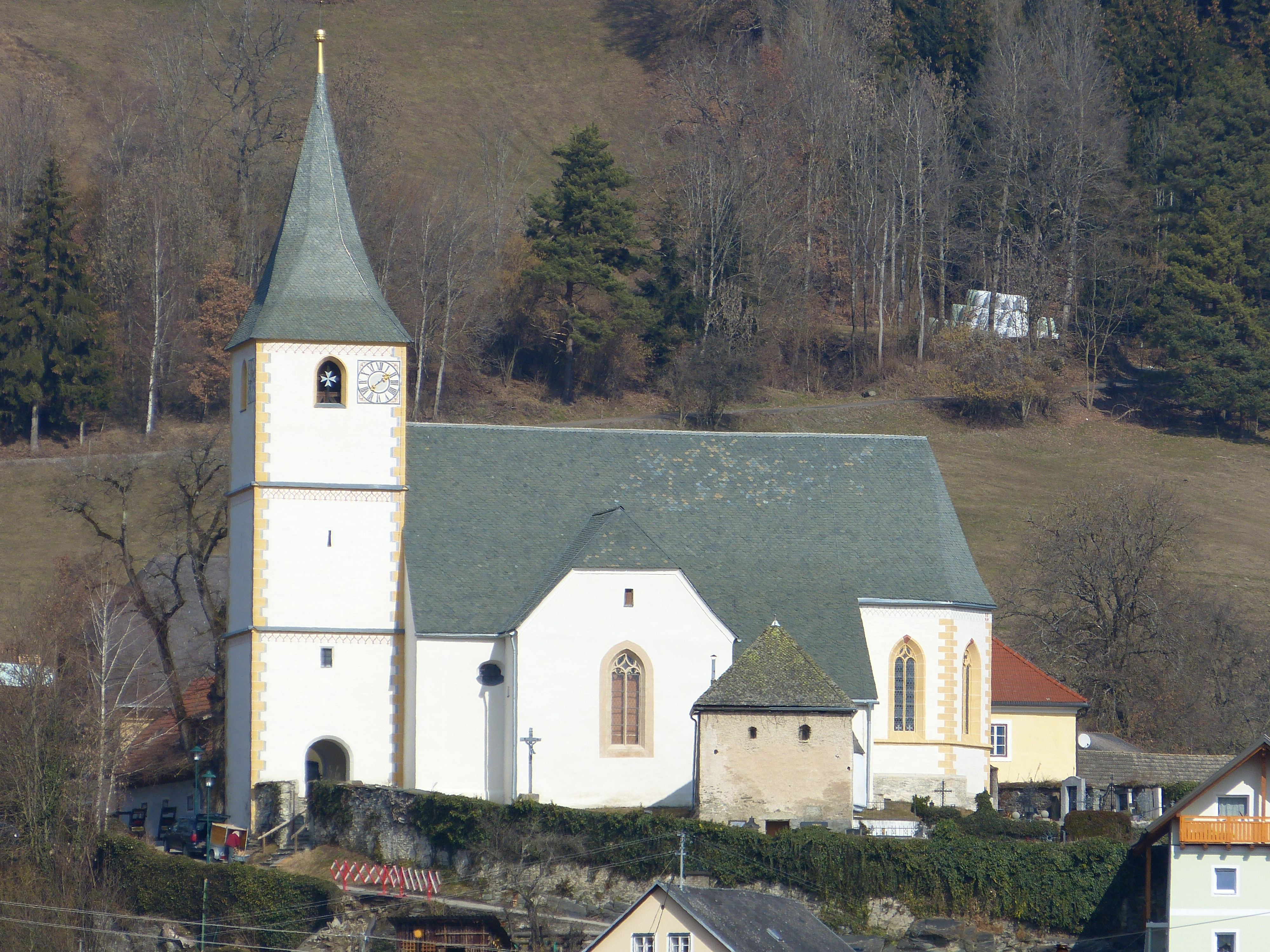 Kath. Pfarrkirche Mariae Himmelfahrt und Karner, in Pulst (Gemeinde Liebenfels, Kärnten).